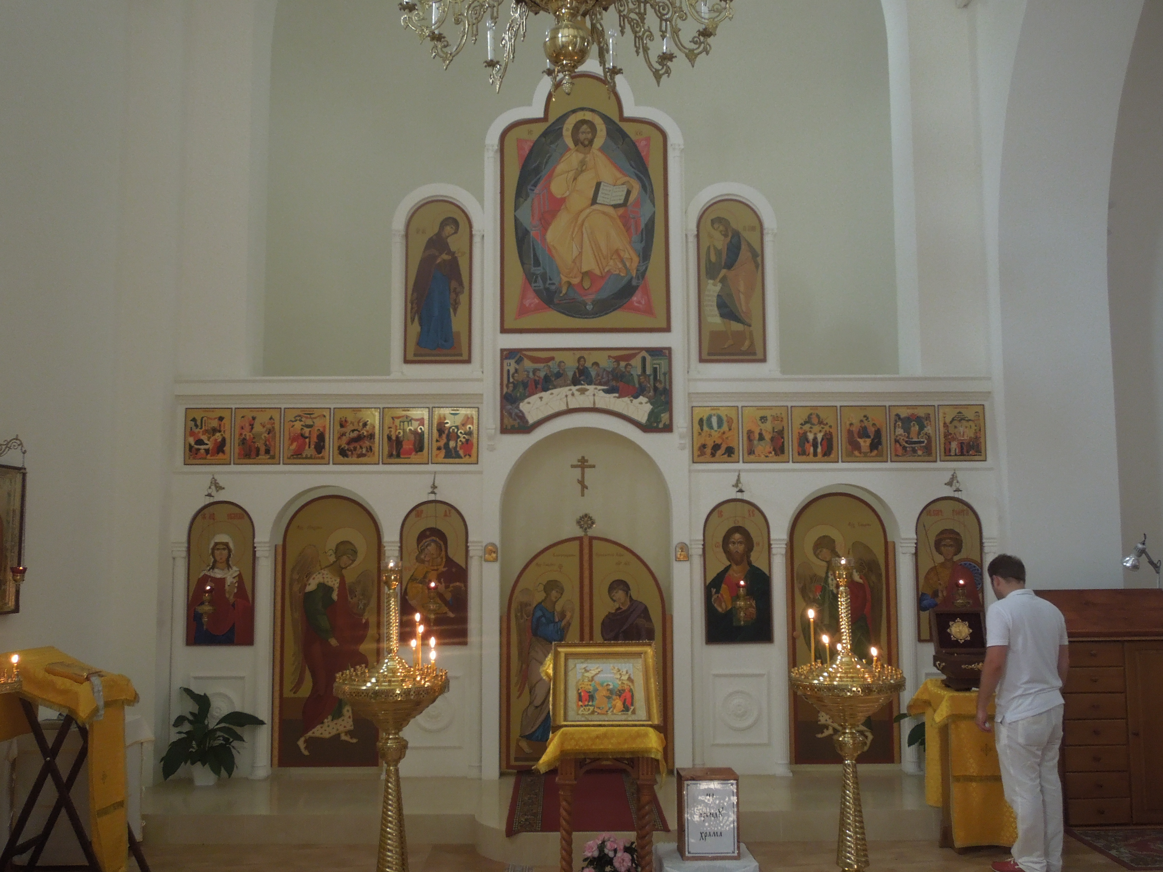 Iglesia Ortodoxa Rusa de la Anunciación, iconostasio (Barcelona)